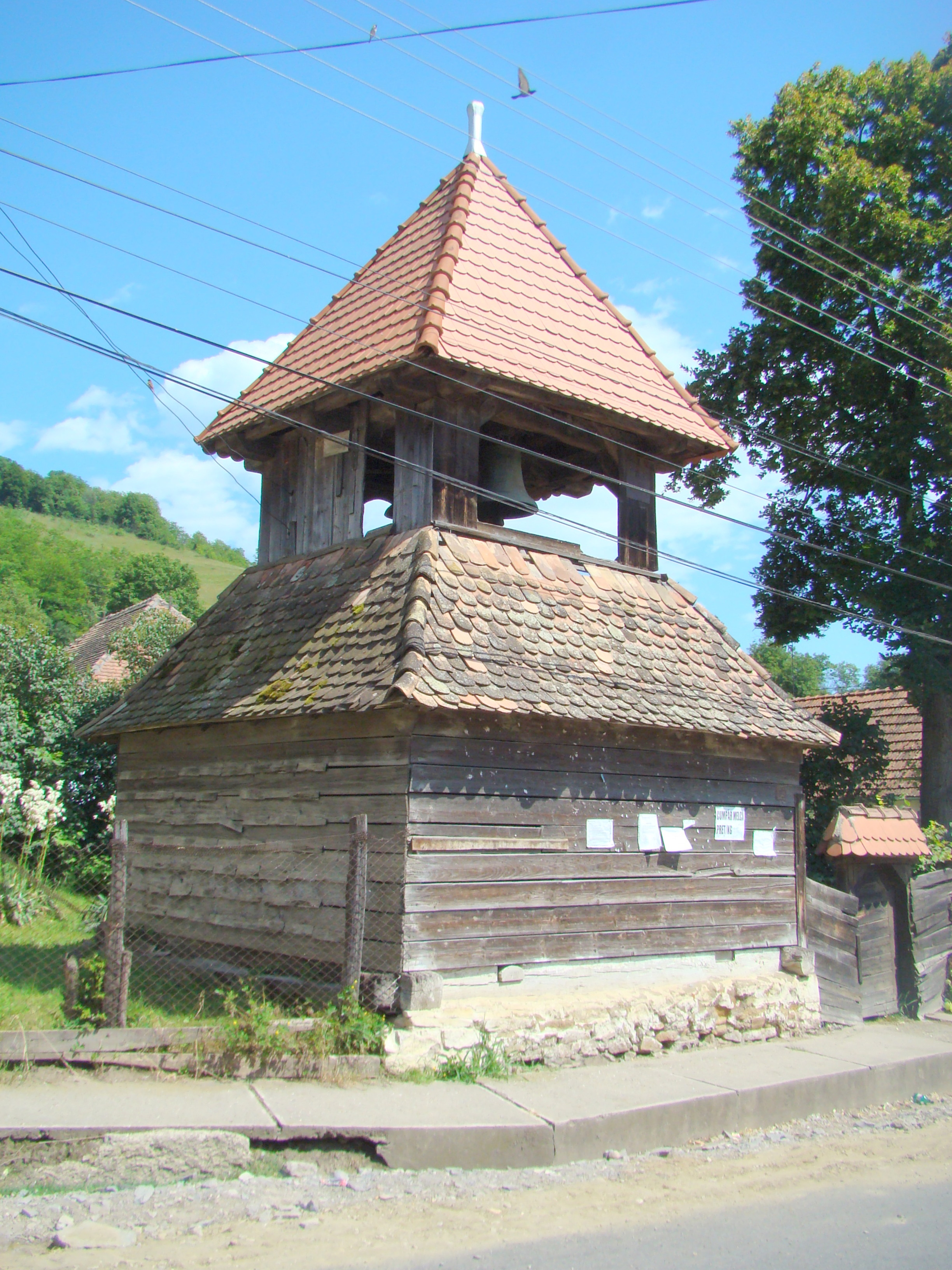 Biserica evanghelică, sat Șmig; comuna Alma